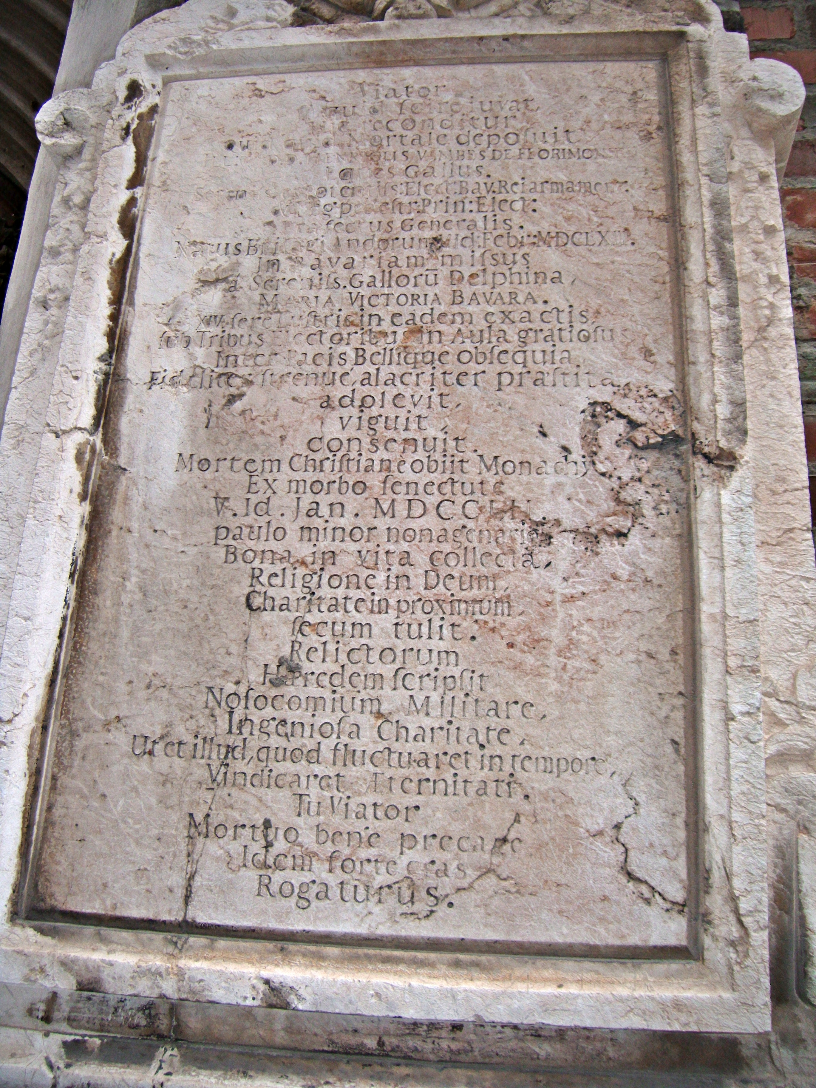 Heinrich Vambes de Florimont (1663-1752), Bayerischer Generalfeldzeugmeister, Epitaph Frauenkirche München